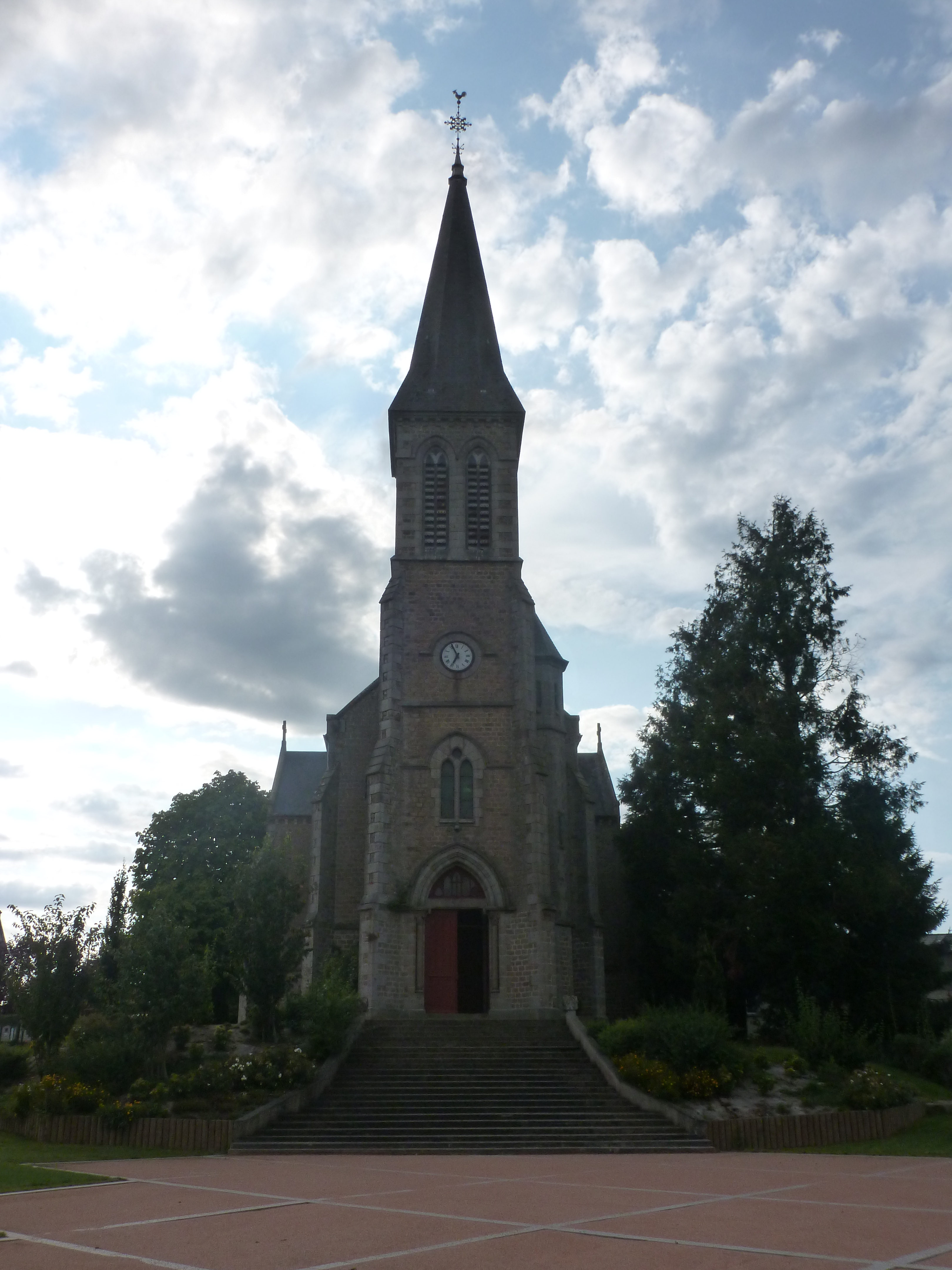 L'église de la Chapelle Moine